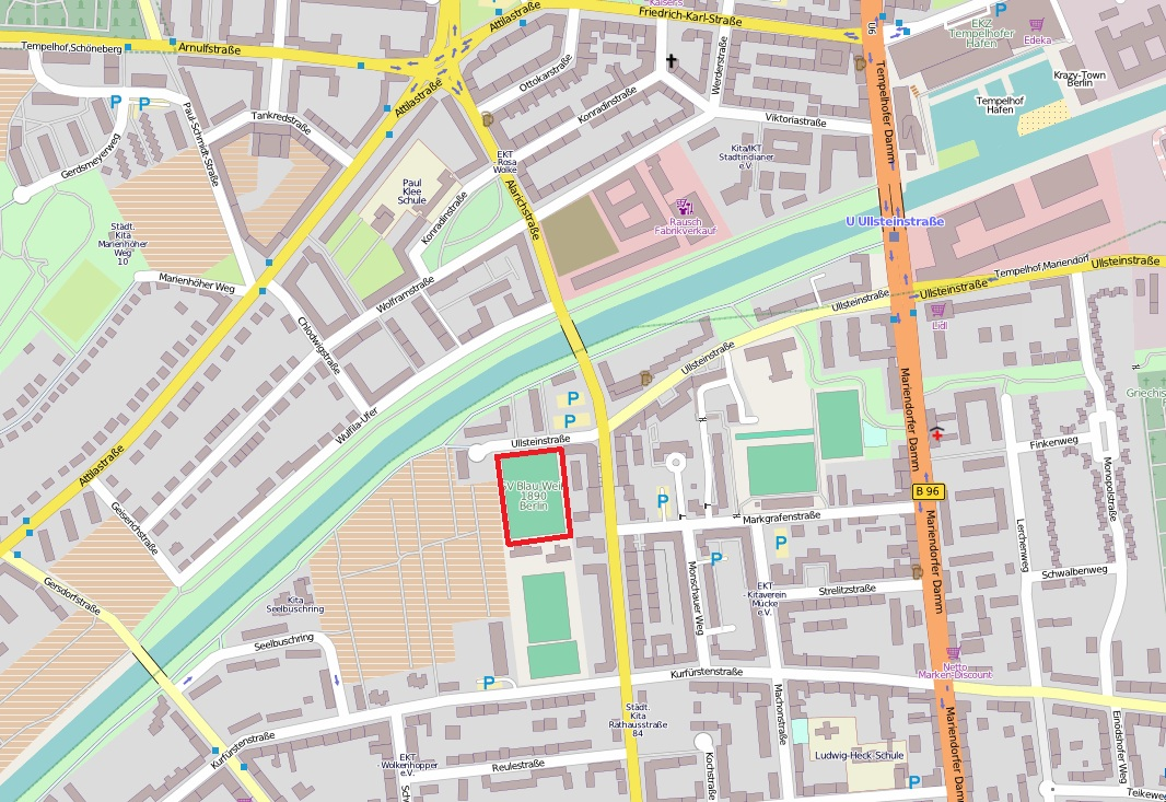 Location of Sportplatz an der Rathausstraße in Berlin-Mariendorf